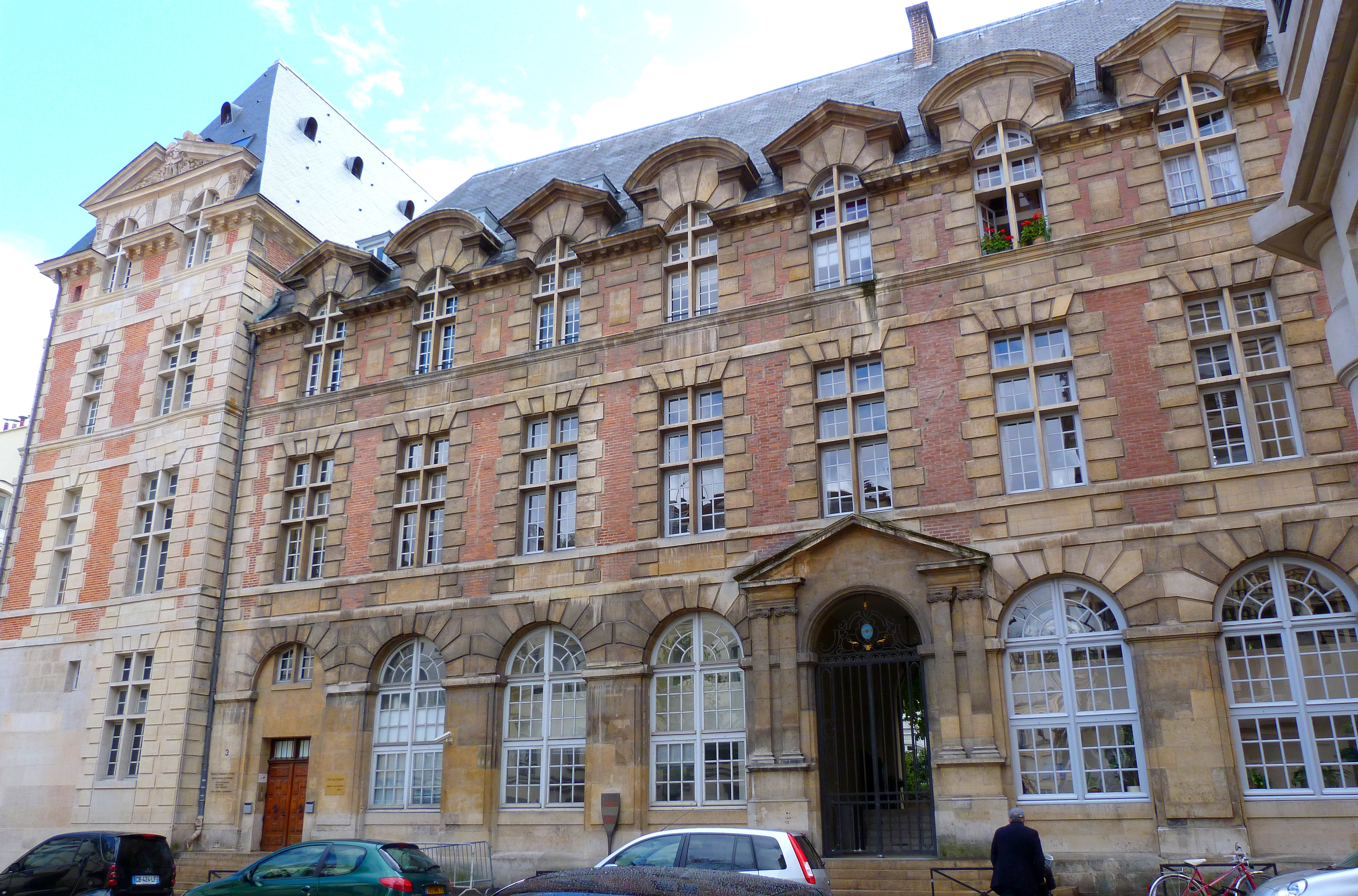 Palais abbatial de Saint-Germain (1586), 2 rue de l'Abbaye, Paris (6e arrond.) - Occupé par l'Institut Catholique.